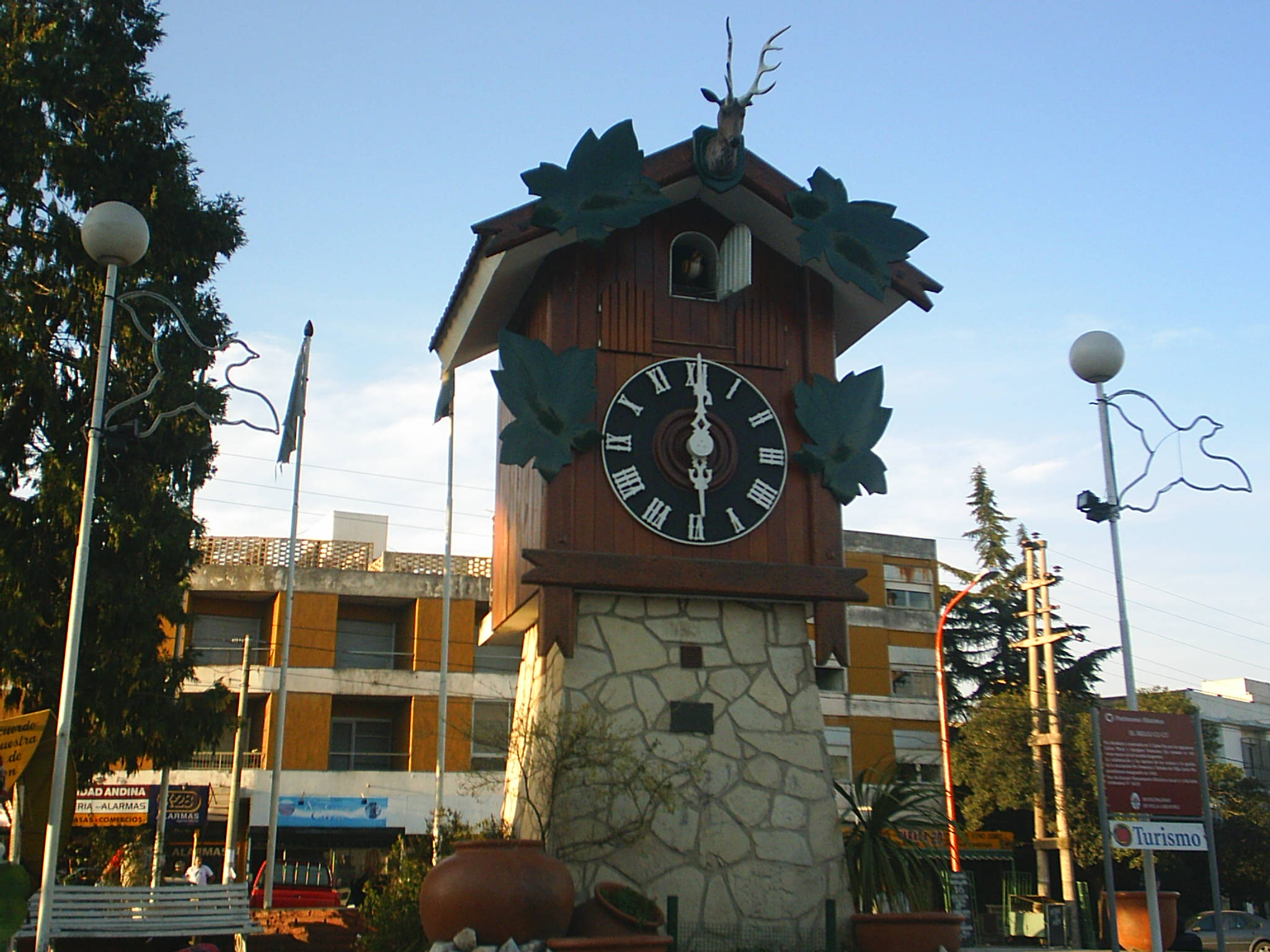 Atractivo turístico, Villa Carlos Paz, Córdoba, Argentina